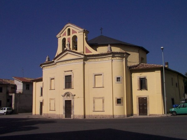 Foto realizzata da Rossi Fernando - Rilasciate con licenza